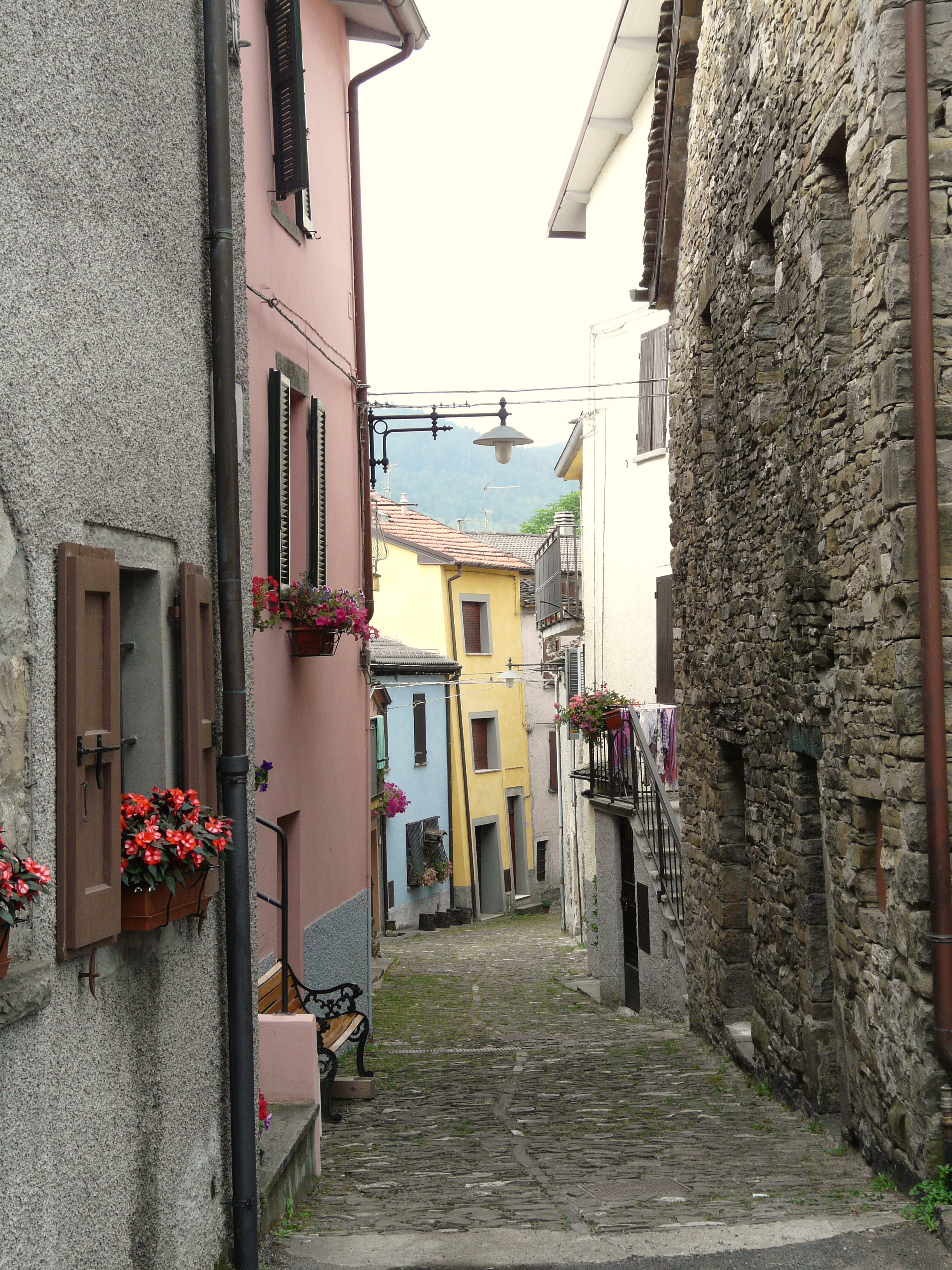 Scorcio di una via del centro storico di Berceto, Emilia Romagna, Italia